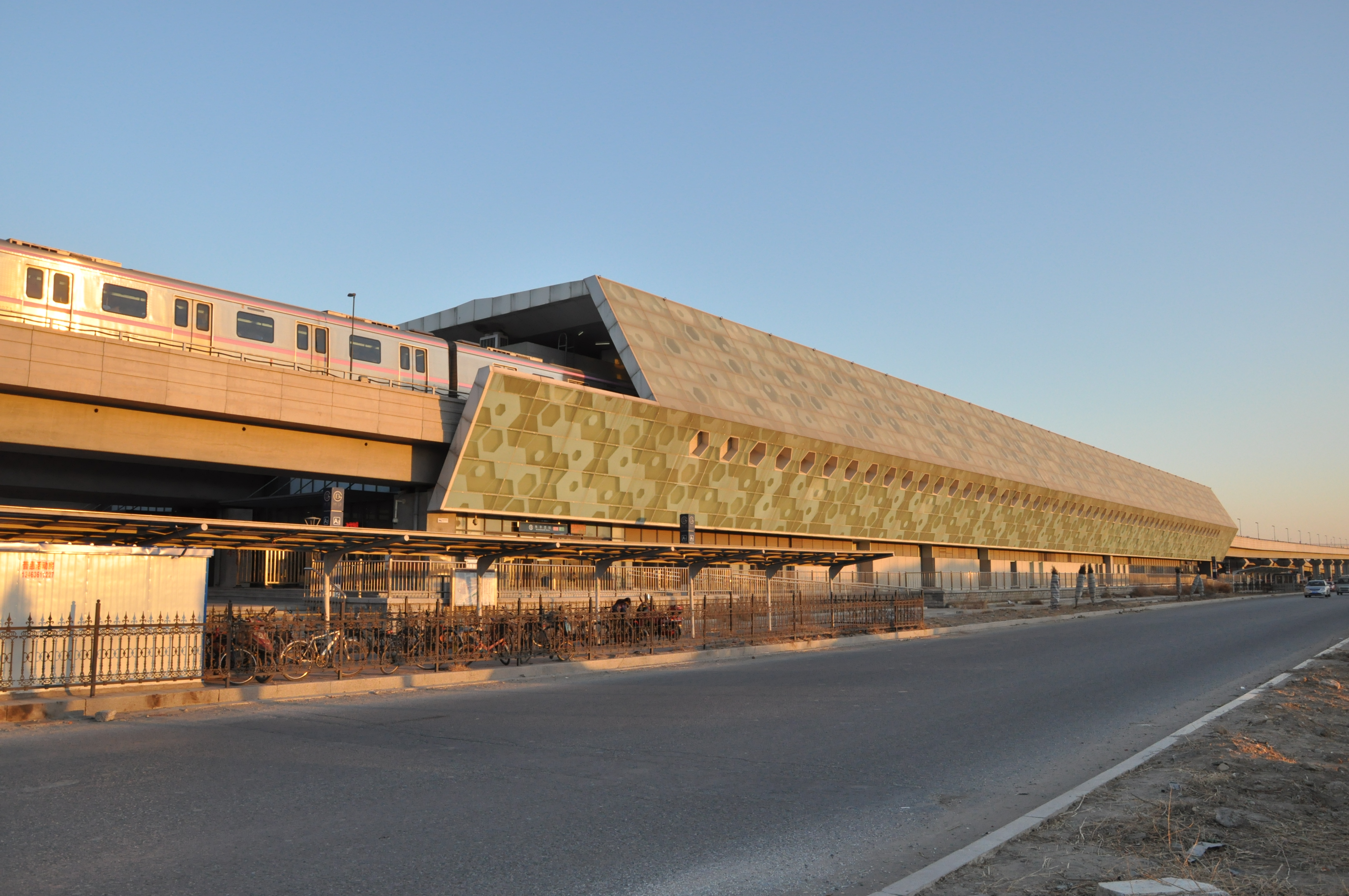 北京地铁朱辛庄站外景。昌平线列车正在驶入车站。